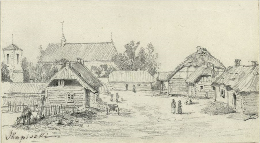 Alfredas Riomeris Apie 1862 m. Popierius, pieštukas, 8,5x15,2.